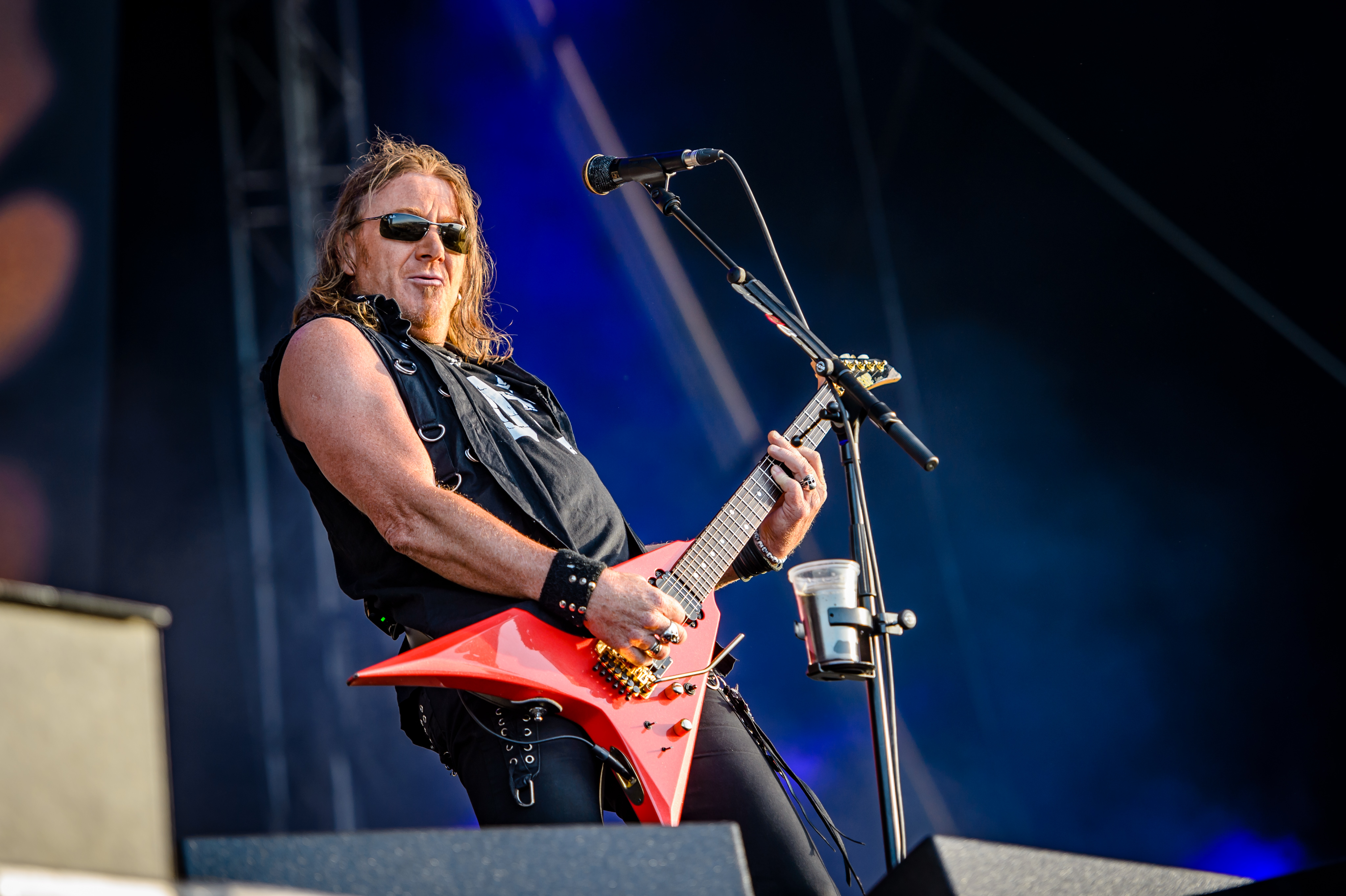 'RockHarz Open Air 2016; Ballenstedt': 'Gamma Ray'